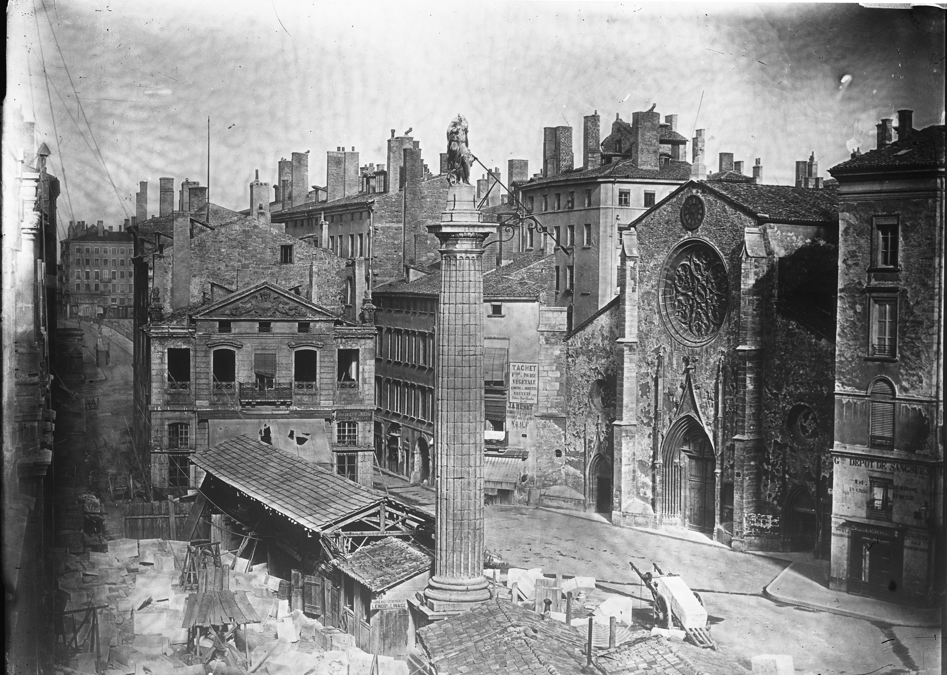 Grands travaux d'urbanisme du Second Empire ; ouverture de la rue Impériale et construction du palais du Commerce et de la Bourse. La salle de concert (détruite pendant les travaux) à l'arrière plan, la colonne du Méridien (détruite en 1858) et l'église Saint-Bonaventure à droite.